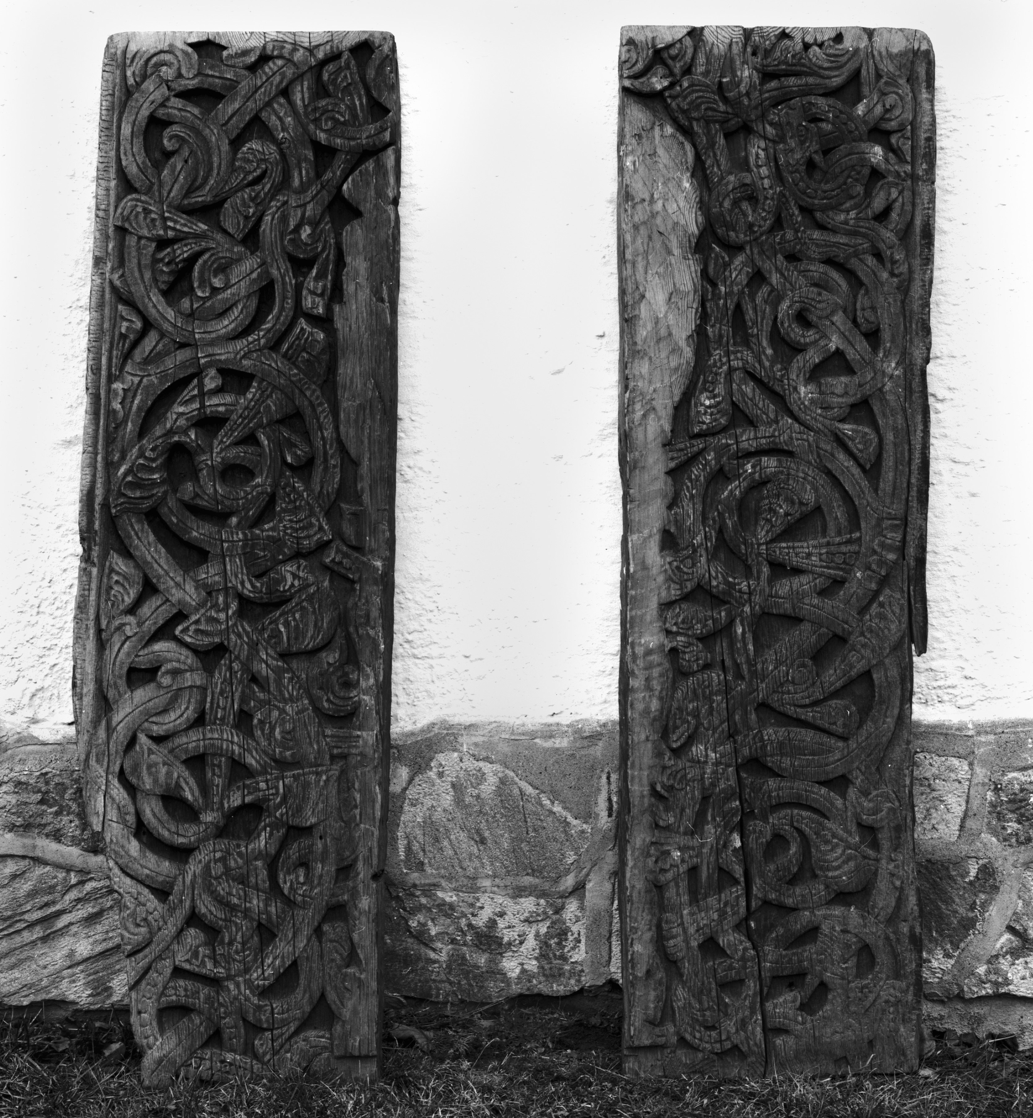 Portalplanker fra Veum stavkirke, Fyresdal. Bilde fra Unimus (jf. søk).